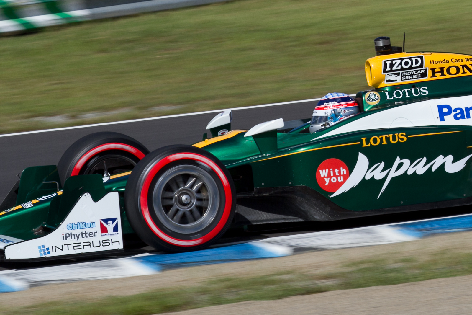 IndyCar Series 2011 Rd.15 Indy Japan 300: Takuma Sato (KV Racing)